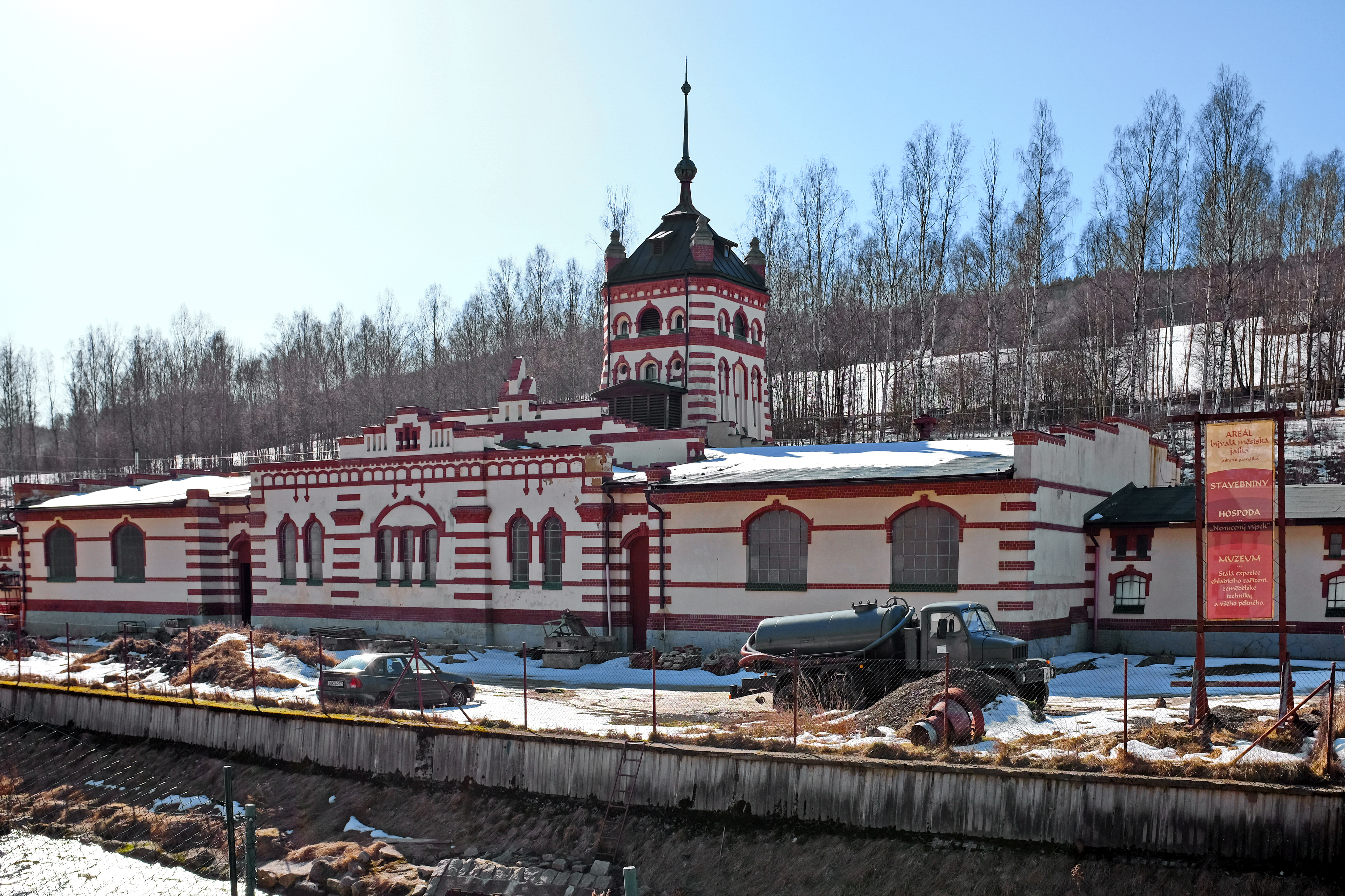 Městská jatka, U elektrárny 1928, 636, Kraslice (okres Sokolov).